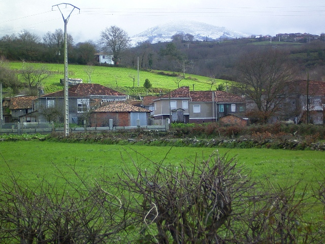 Barxela es un pueblo pequeño aquí se puede un poco de él